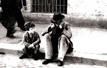 Una inquadratura di "Ladri di biciclette" con Enzo Staiola e Lamberto Maggiorani (De Sica, 1948)